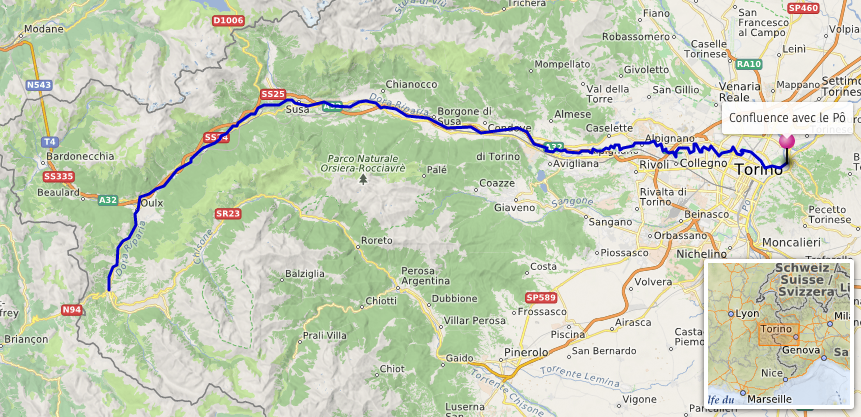 Carte réalisée d'après les données Openstreetmap This map may be incomplete, and may contain errors. Don't rely solely on it for navigation.